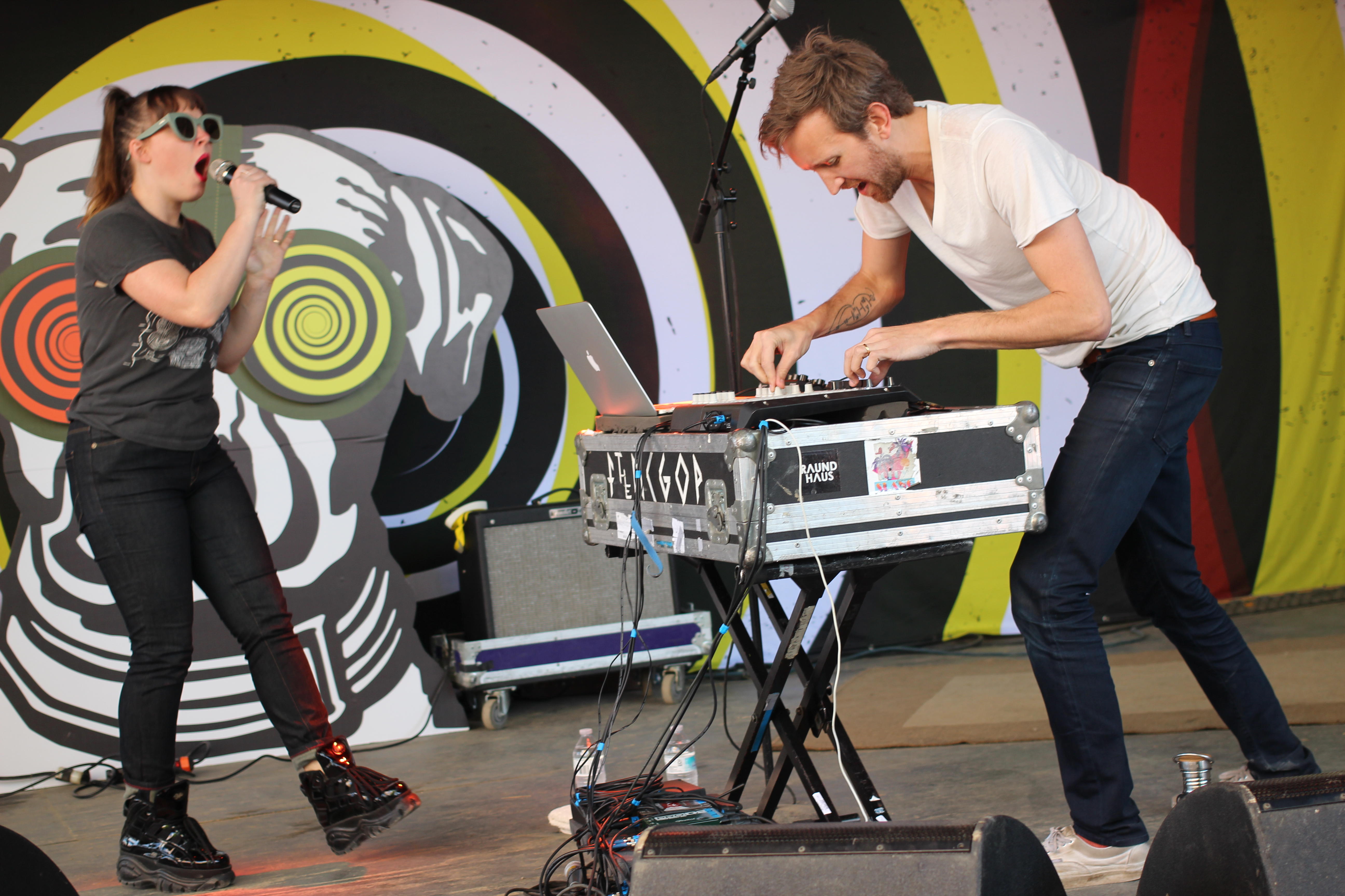 Sylvan Esso